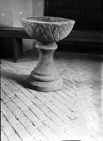 Dopfunt av täljsten. Kategori: (04) Dopfuntar Dopfunt av täljsten.